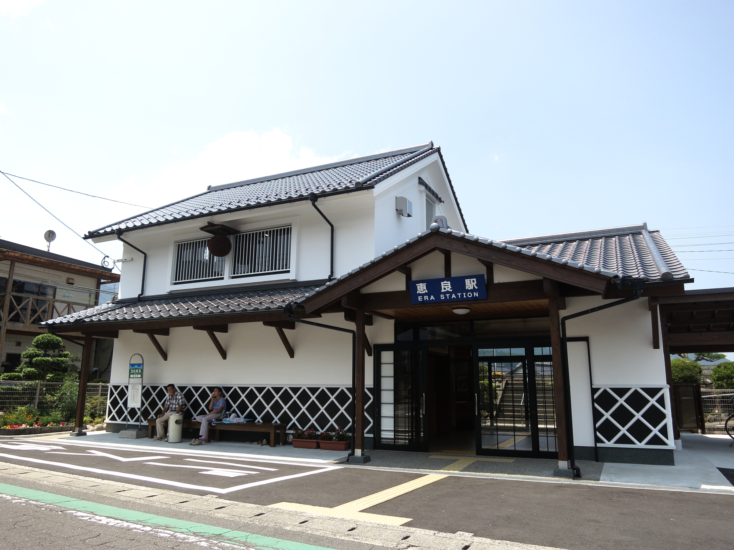 駅舎(2015年8月3日)